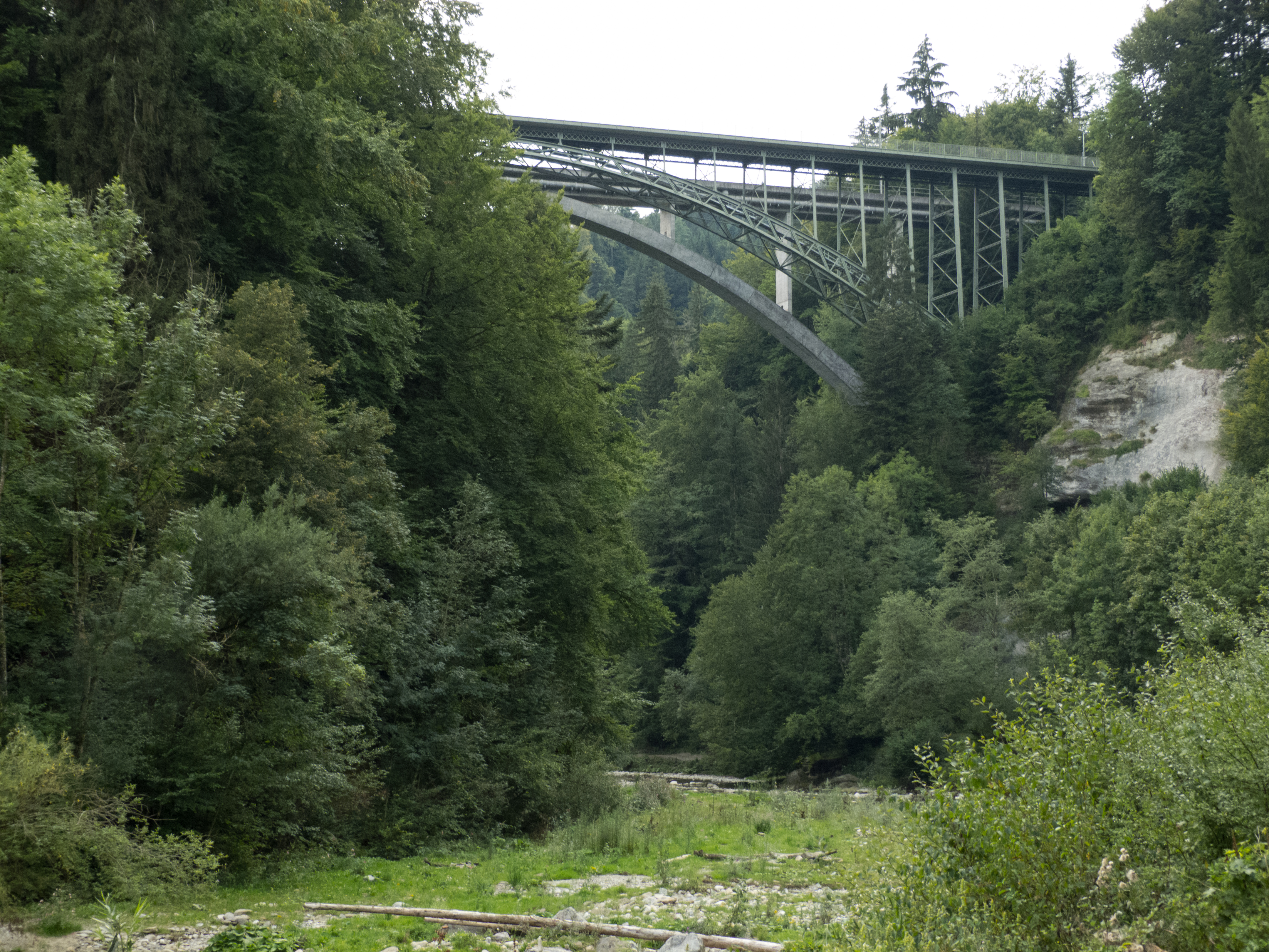 Eiserne Hochbücke, westliches Wiederlager